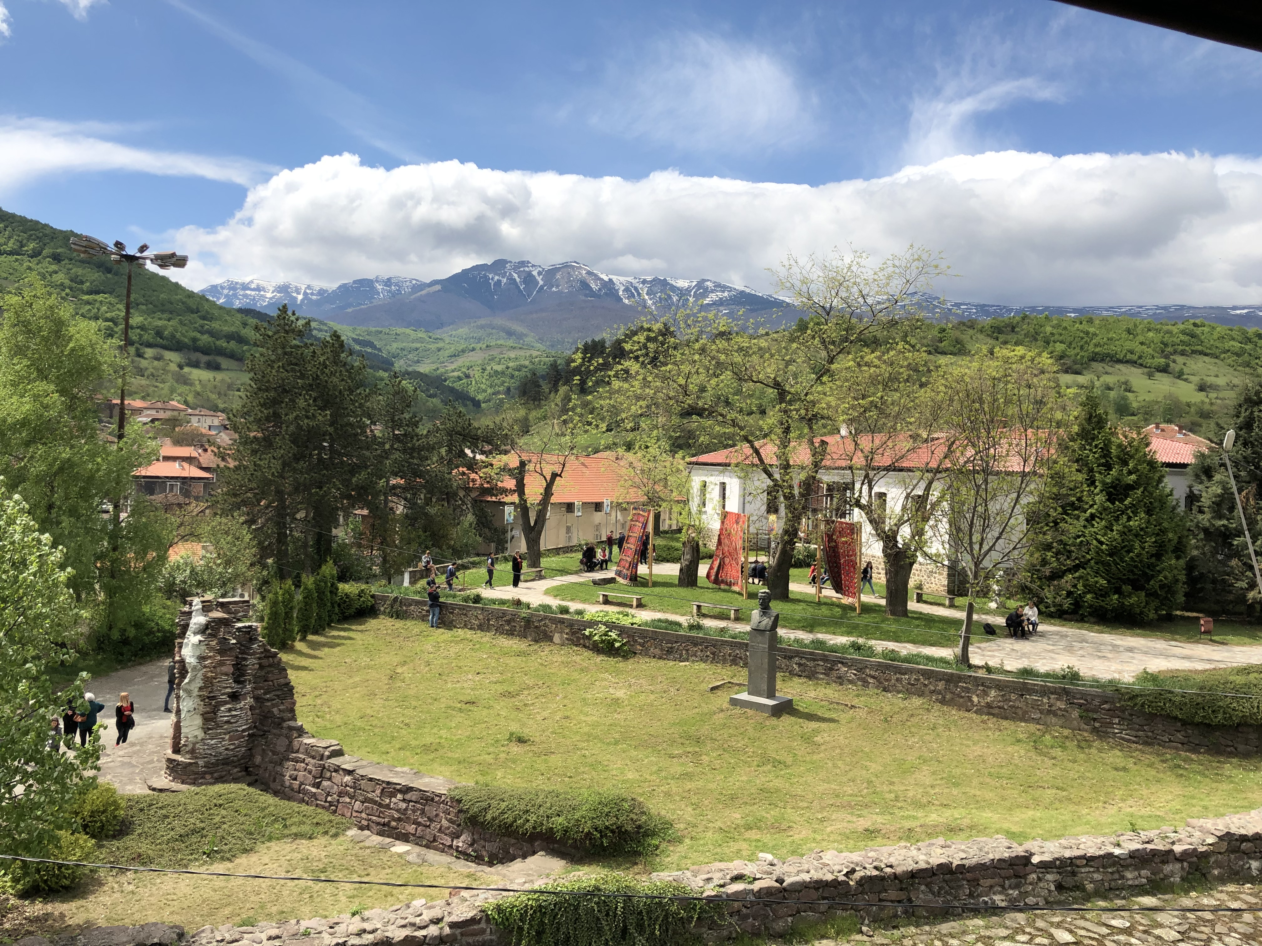 Фестивал на Чипровския килим, 28 април 2019г.